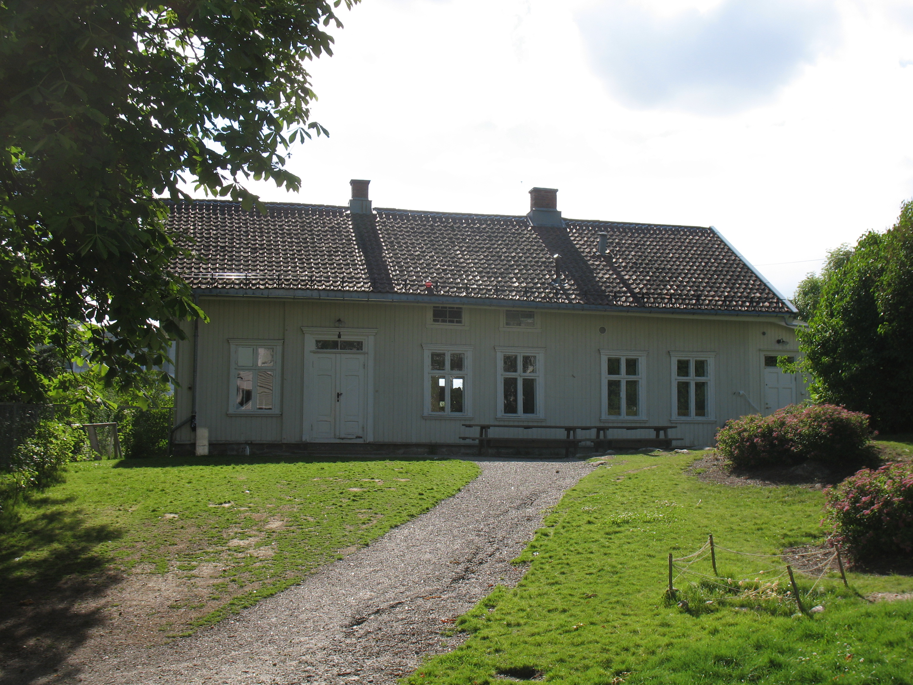 Rustad gård i Oslo.